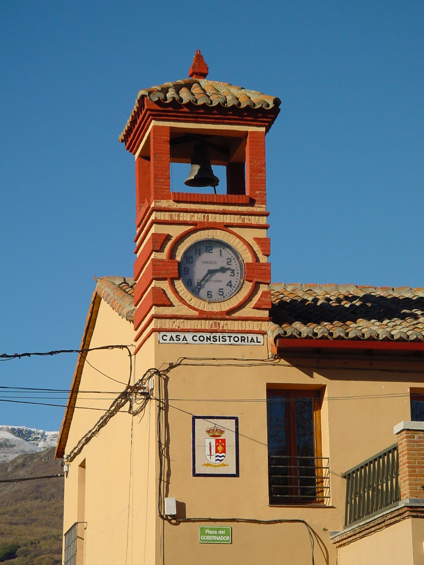 Torre del Reloj y ayuntamiento en Pinilla del Valle.